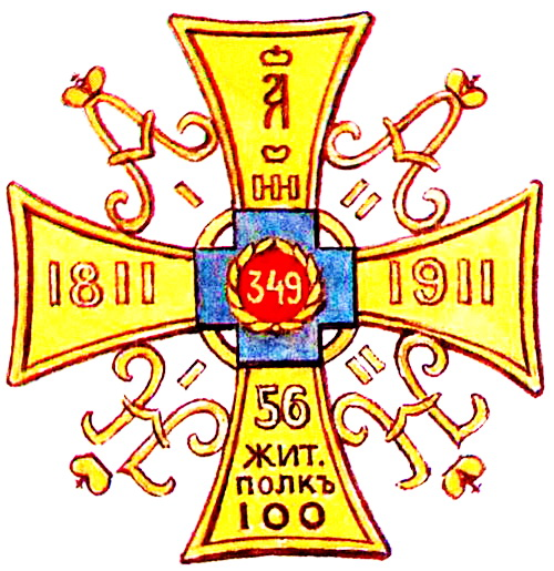 Badge of 56 Zhitomirski Regiment